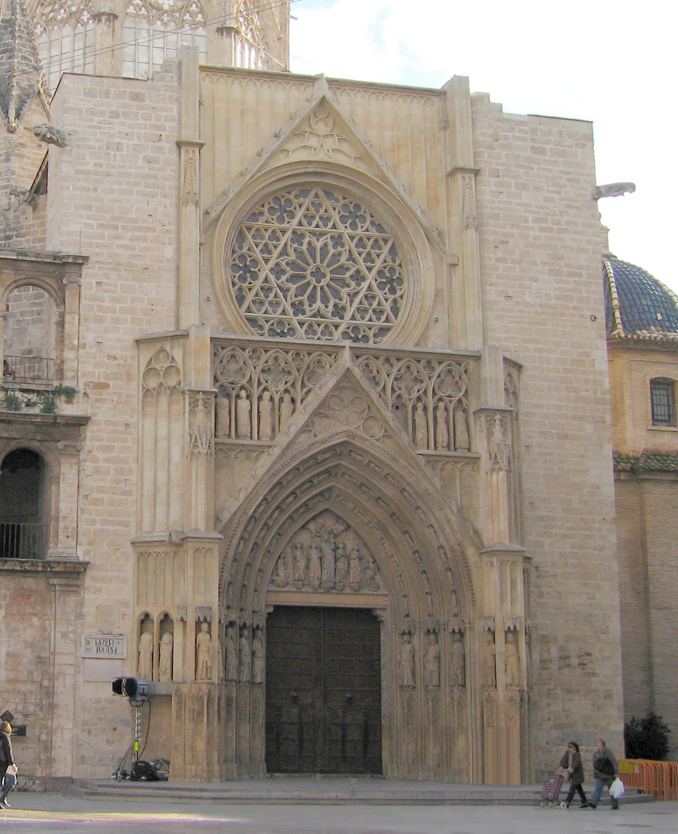 porta apostols seu valencia